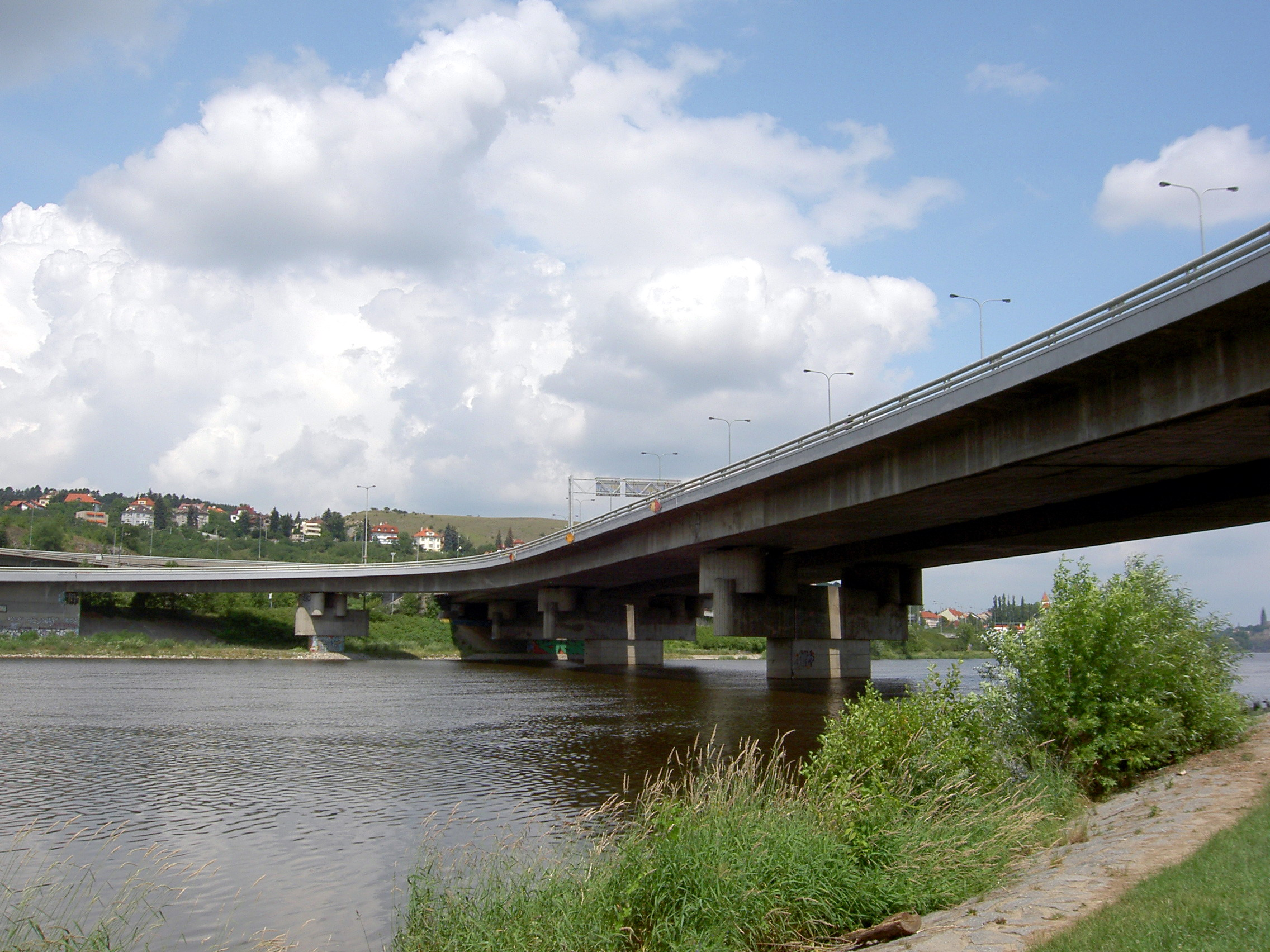 Barrandovský most